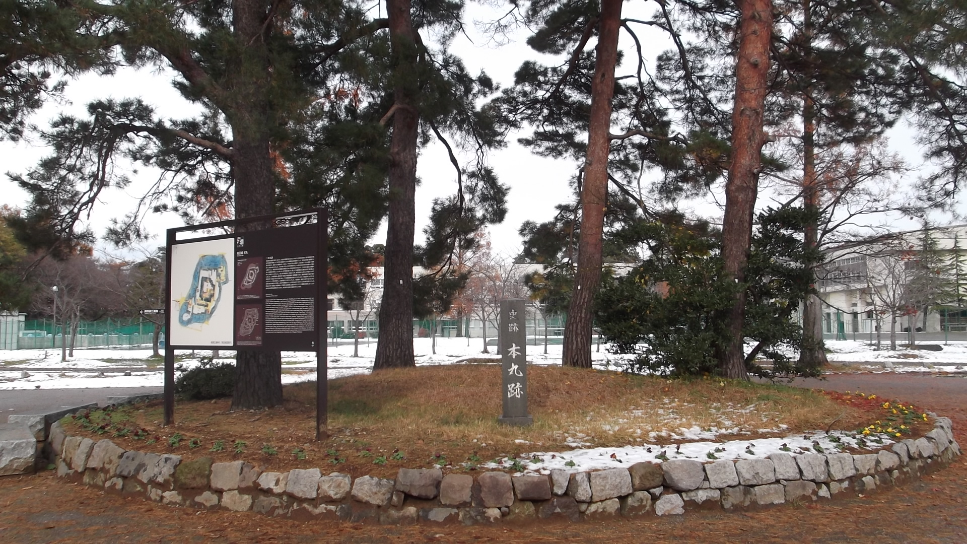 越後高田城本丸跡（2012年12月撮影）